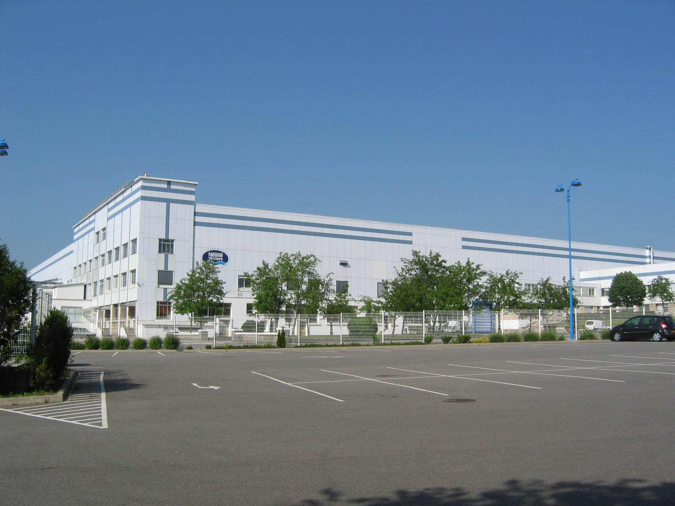 Usine d'embouteillage de Contrex, à Contrexéville, Vosges, Lorraine, France